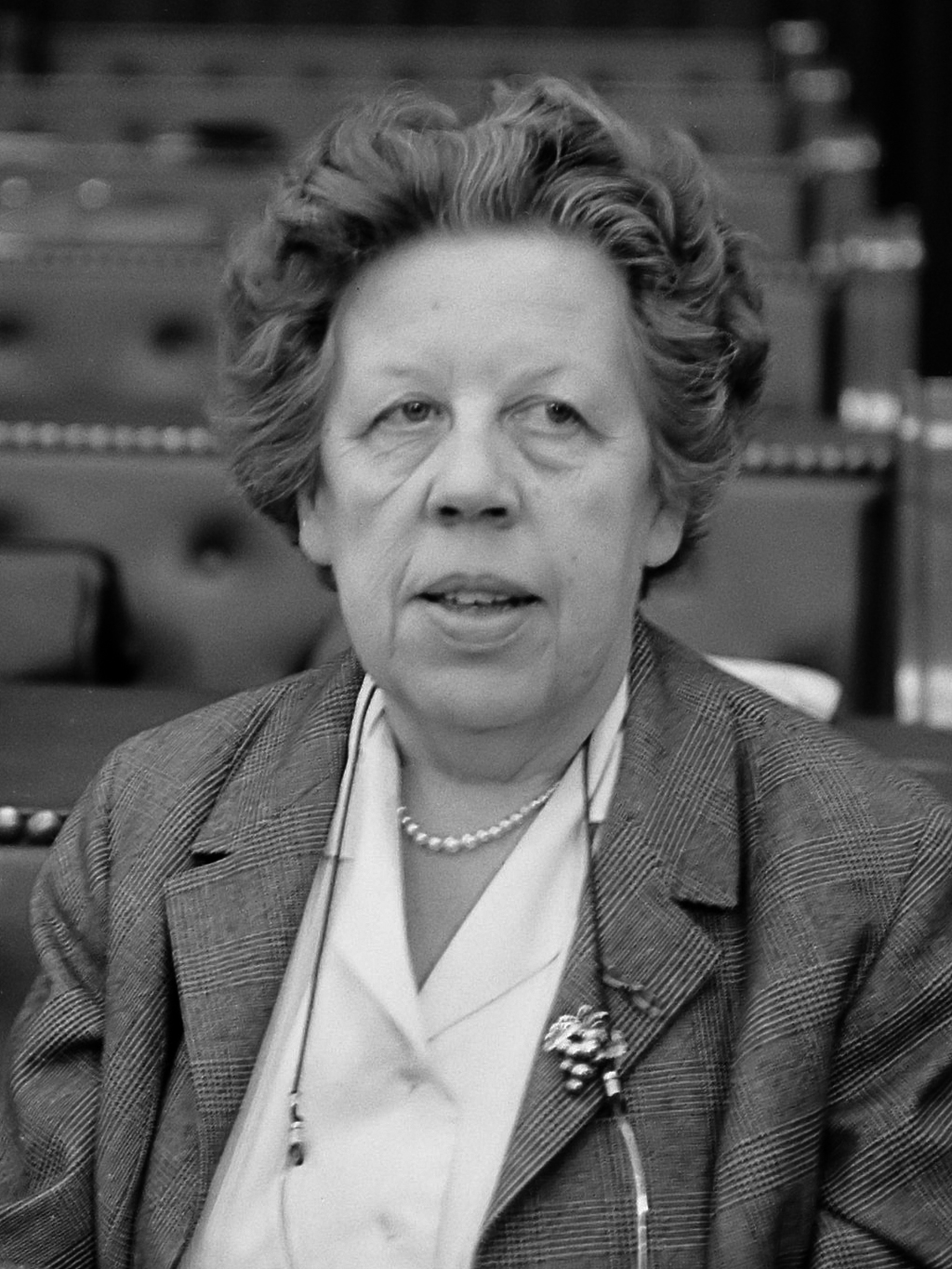 Omroep en tv-nota in de Tweede Kamer, Wttewaall van Stoetwegen (kop) 7 juli 1965